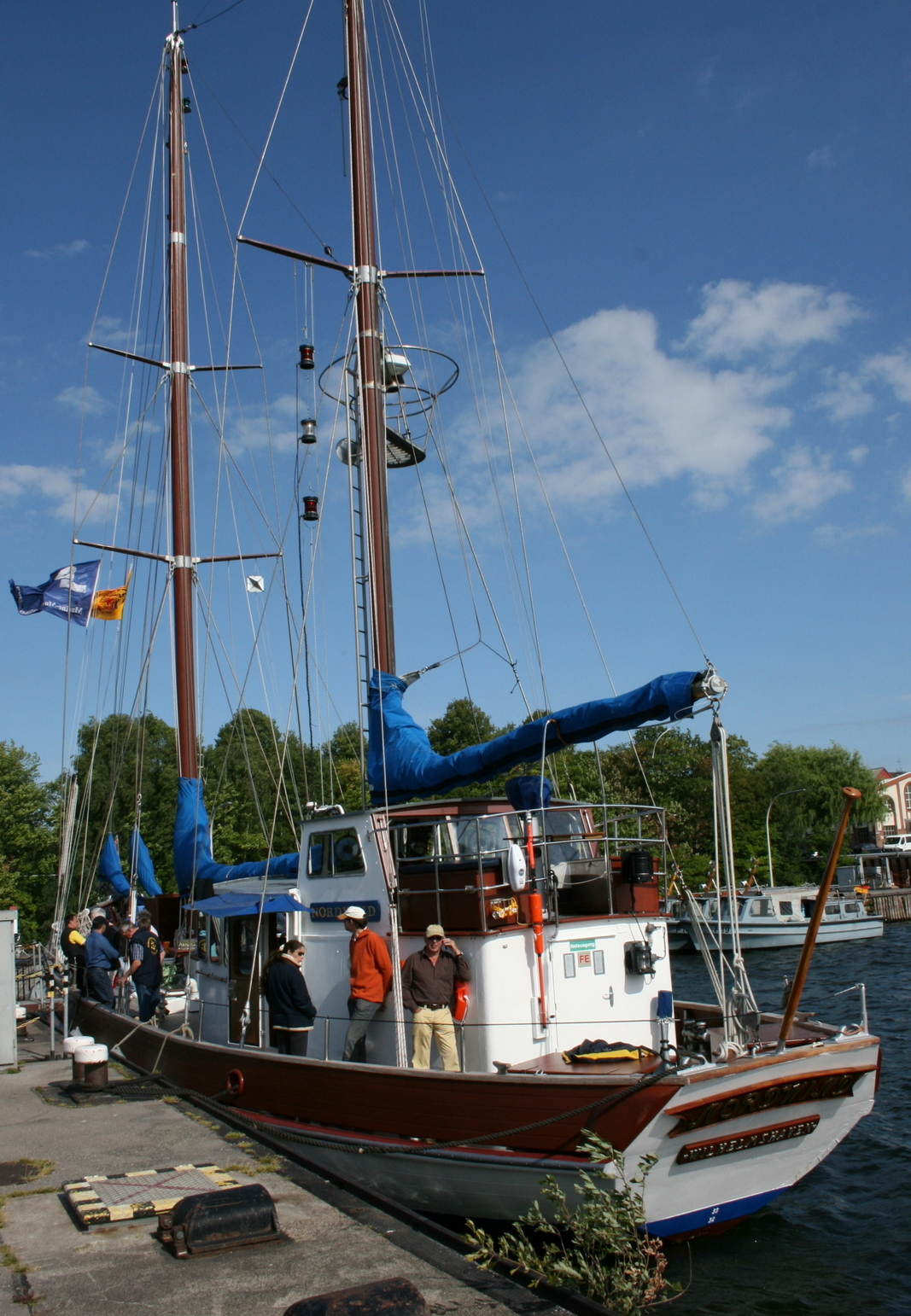 Das ehemalige Segelschulschiff "Nordwind" auf der Kieler Woche.